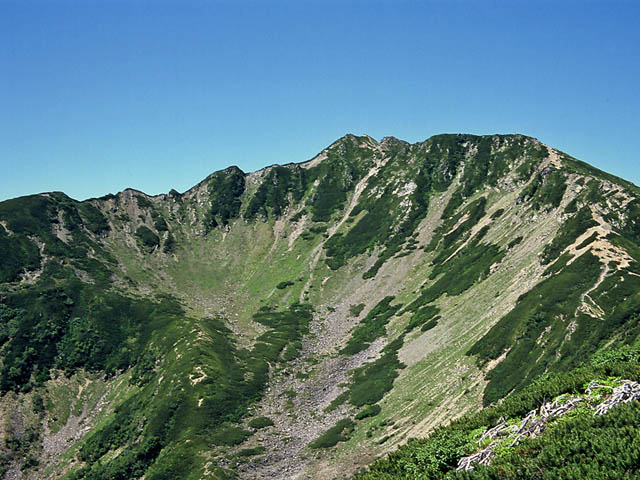 Senjyou-dake, 3033m en Sierra Akaishi, Japon. Desde Circo glaciar de Ko-senjyo. 小仙丈カール方面から見た赤石山脈・仙丈岳(3033m)。